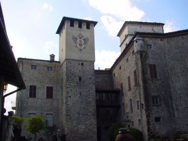 Il castello dei Rati Opizzoni, feudatari per conto del duca di Milano a Torre Ratti di Borghetto di Borbera (AL).